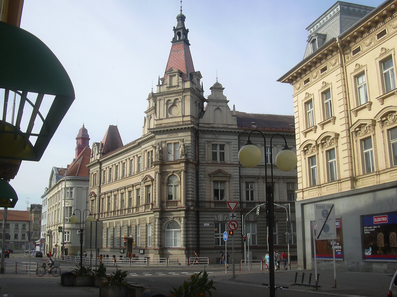 Historická budova pošty v Prostějově, Poděbradovo nám. 979/13, (Czech Republic)